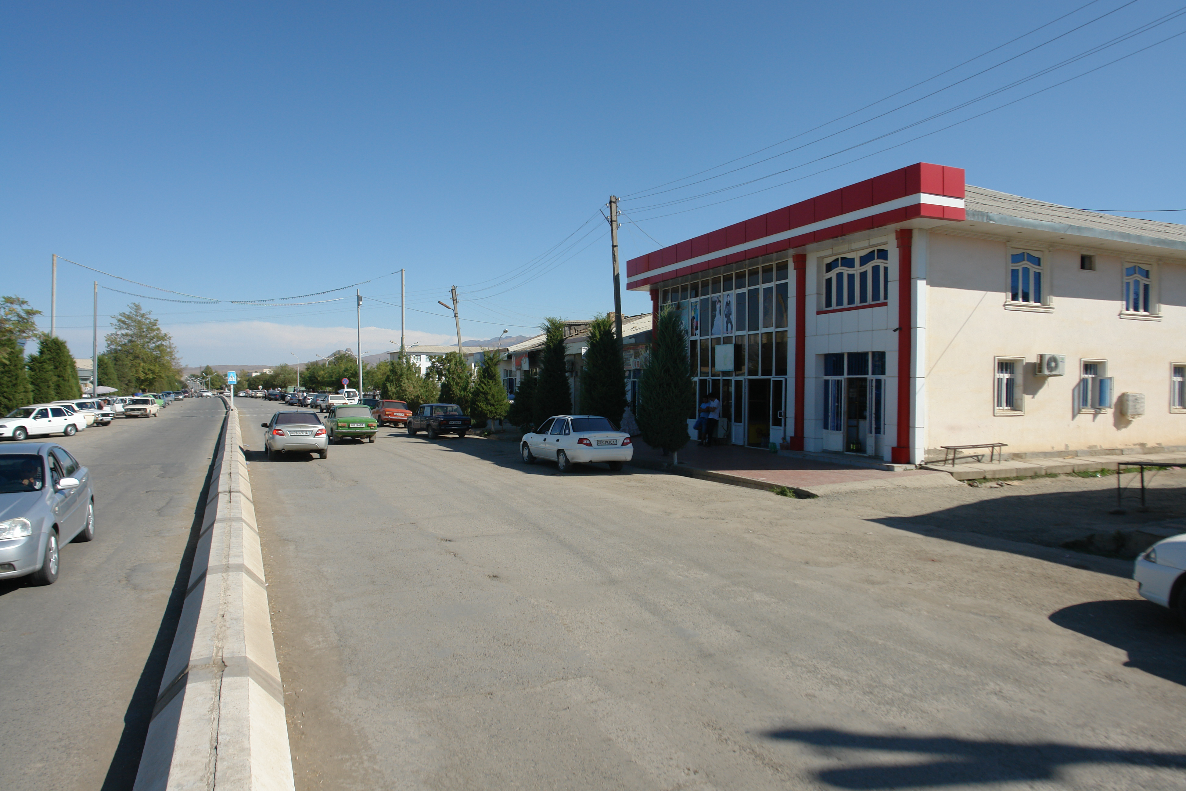 Новый Кишлак, Фарижская область, Узбекистан